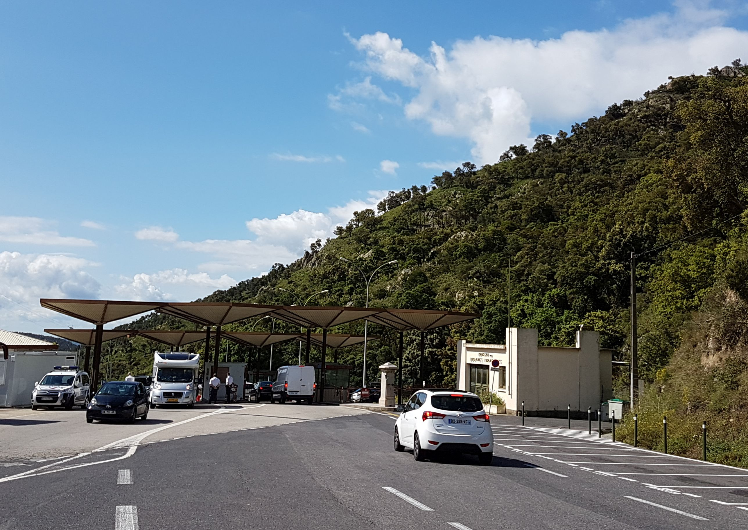 La douane du Perthus